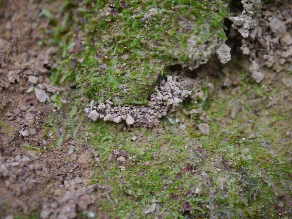 Cybaeus sp. ：ナミハグモの１種の巣 2016/08/31 和歌山県田辺市：Tanabe City. Wakayama Pref. Japan